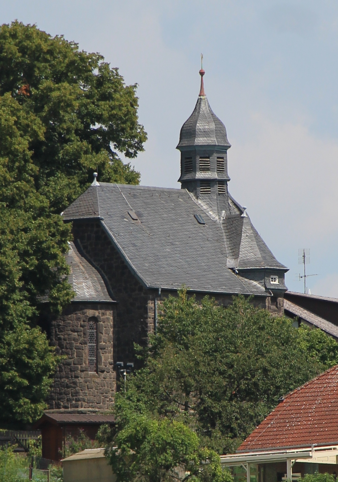 Lirche